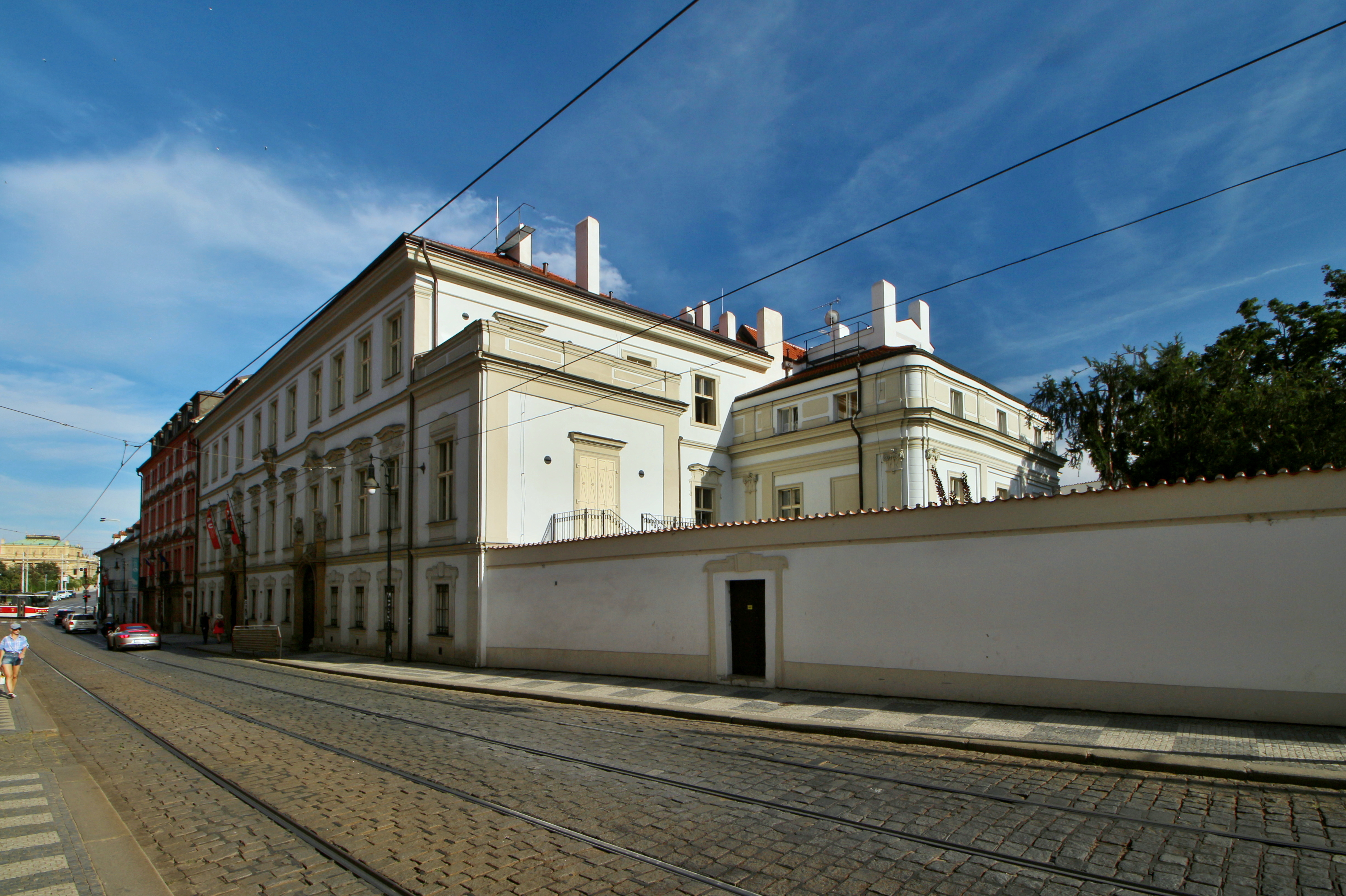 Praha 1-Malá Strana, Letenská ulice